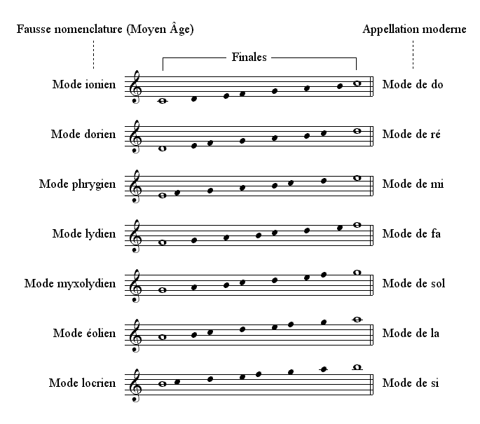 Description : Modes anciens Source : Personnelle Licence : GFDL